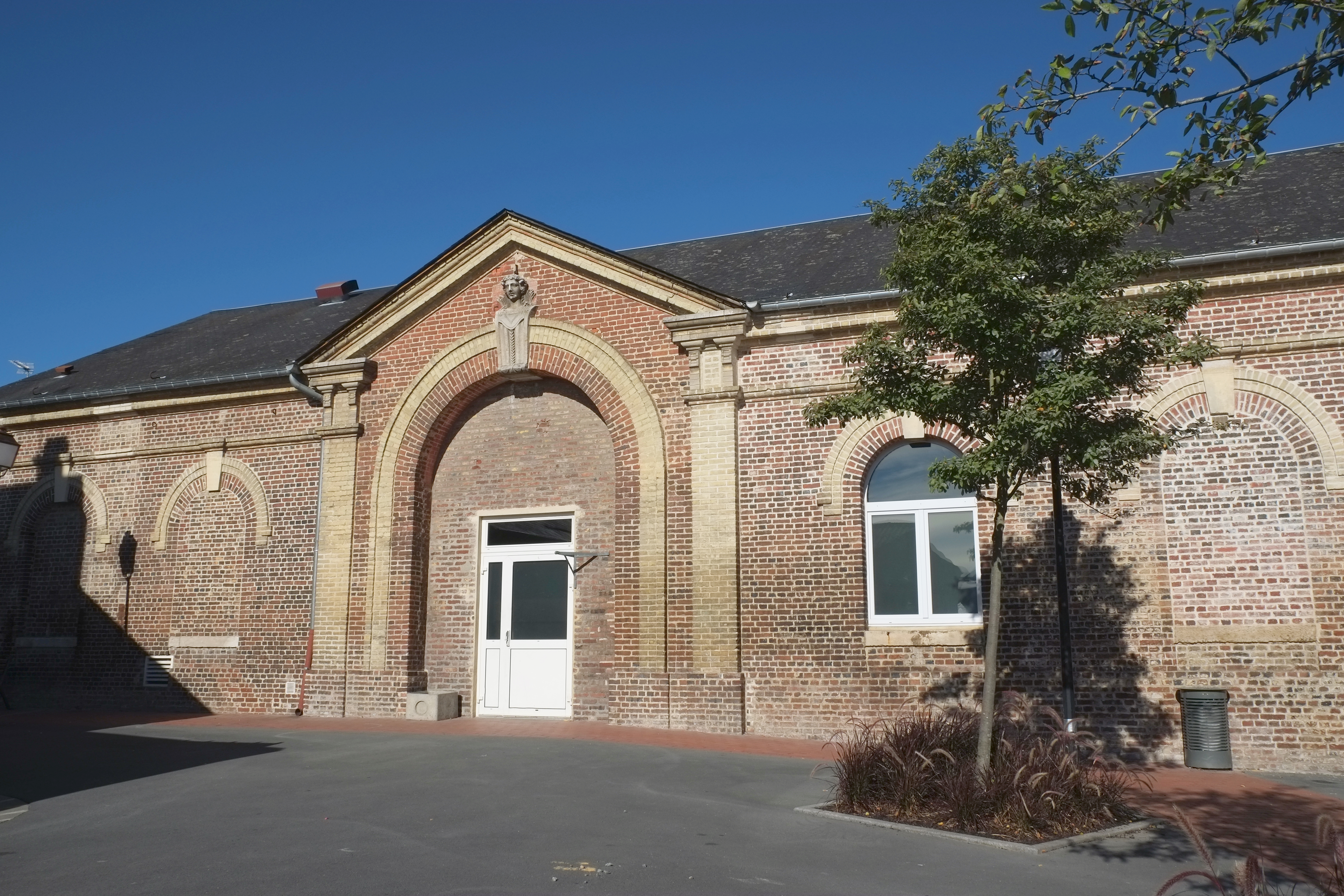 Halle aux blés in Beuzeville im Département Eure, Frankreich